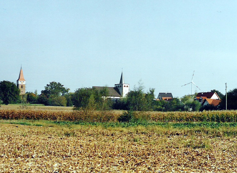 Ansicht von Minfeld mit Windrad